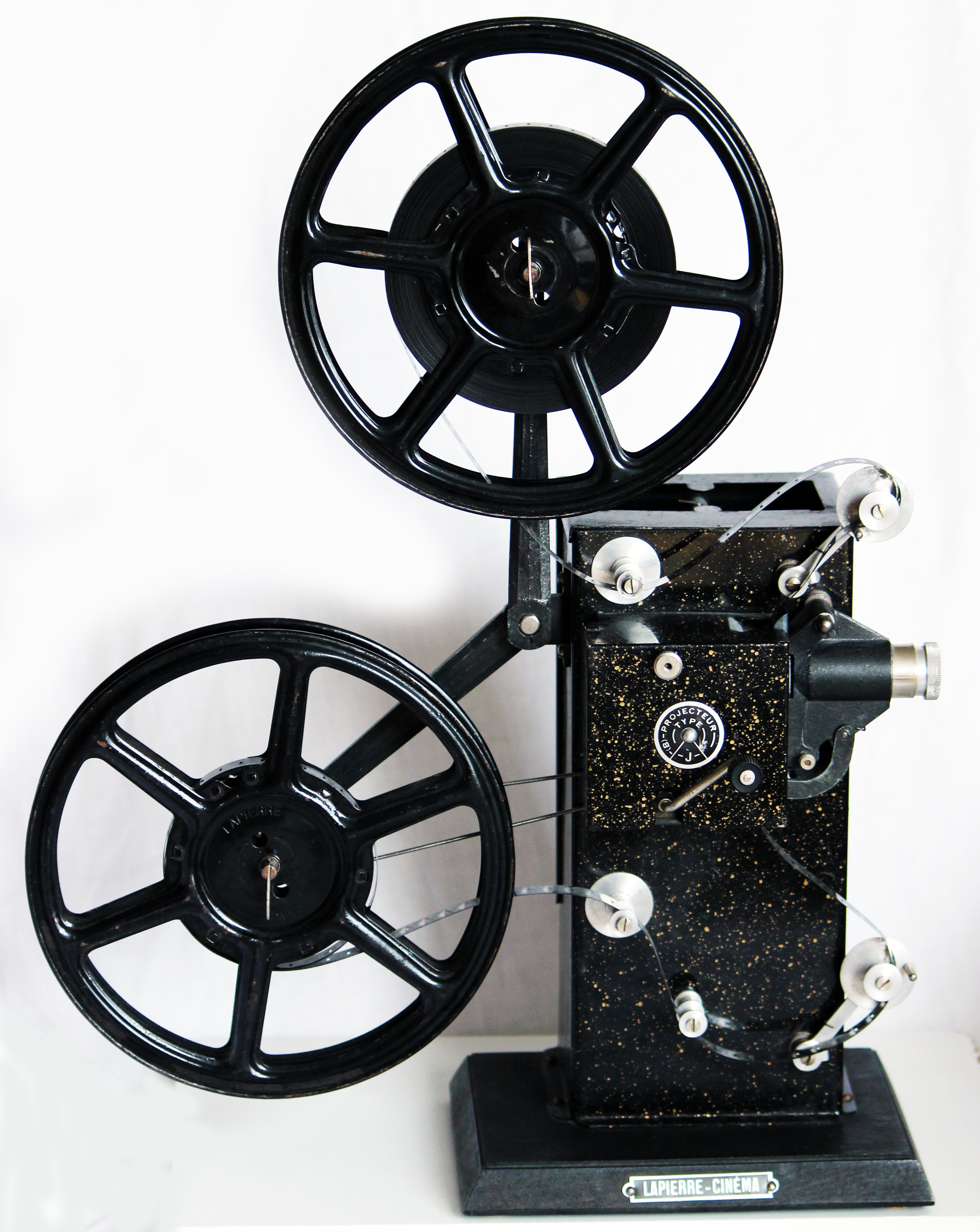 Cet appareil de projection de la marque LAPIERRE, diffusé dans les années 1950, se charge avec des films au format 9,5 mm. Il est équipé d'une ampoule électrique sur courant 110 volts, mais l'entraînement du film est assuré par une manivelle.